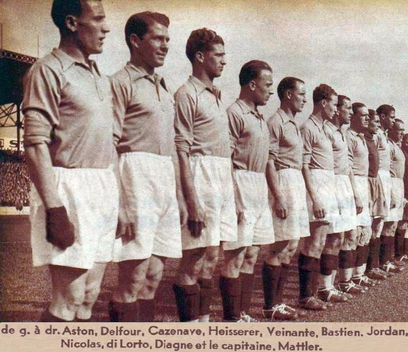 L'équipe de France de football à la Coupe du monde 1938 (victoire face à la Belgique).